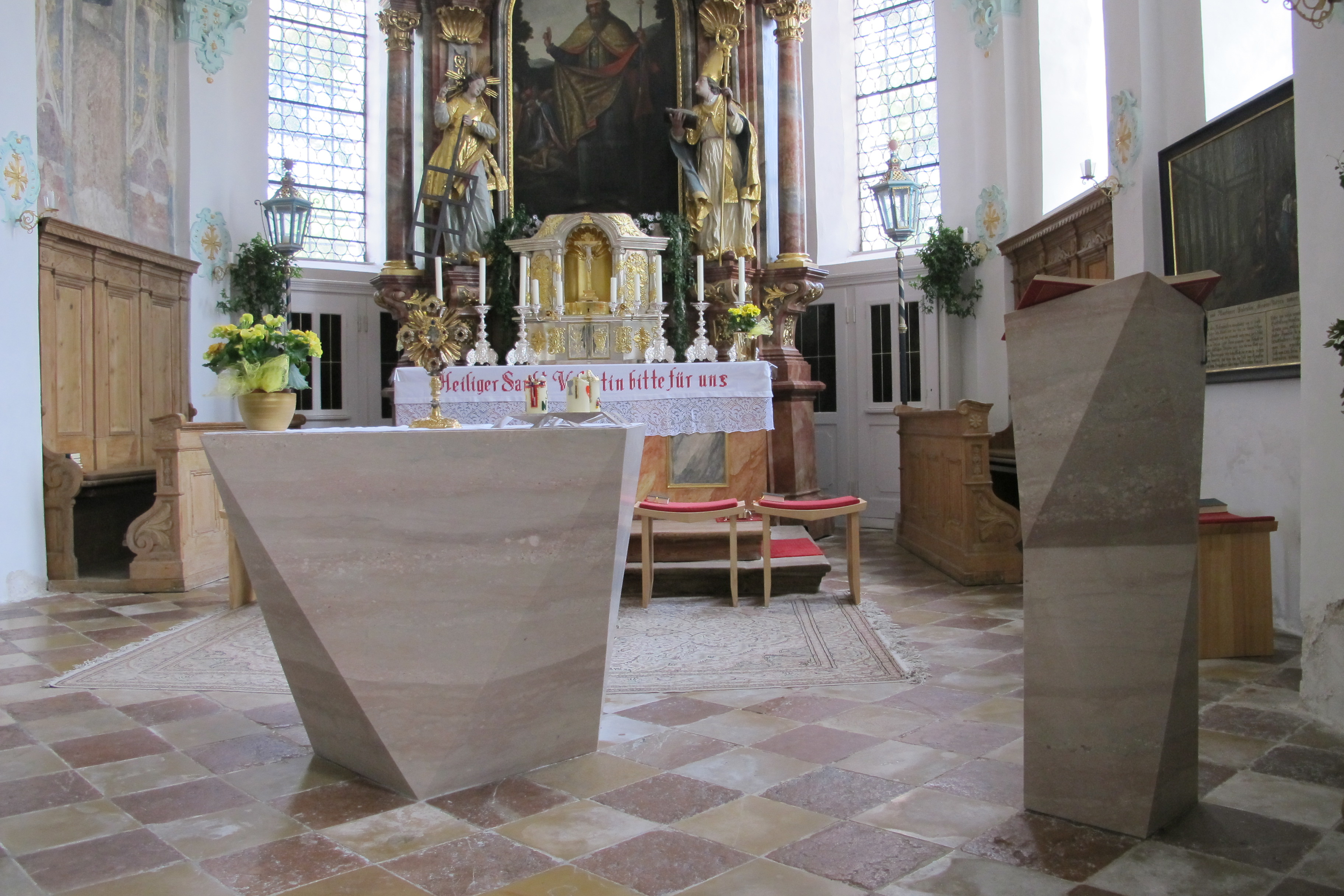 Wallfahrts- und Pfarrkirche St.Valentin, Marzoll Volksaltar und Ambo, Frontalansicht Material: Untersberger Marmor, geschichtet Bildhauer: Johann Brunner Herstellungsjahr: 2009